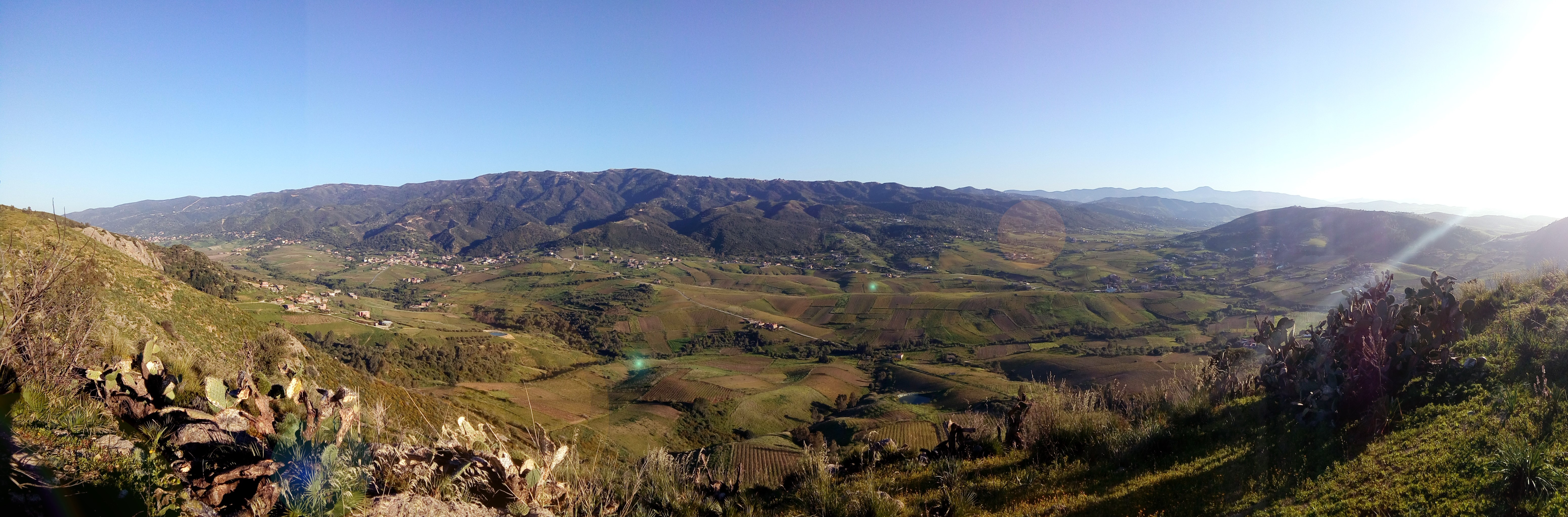 Les villages de Irafaan vues depuis le mont de Bouifri (Ijdayen)